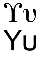 greek letter upsilon